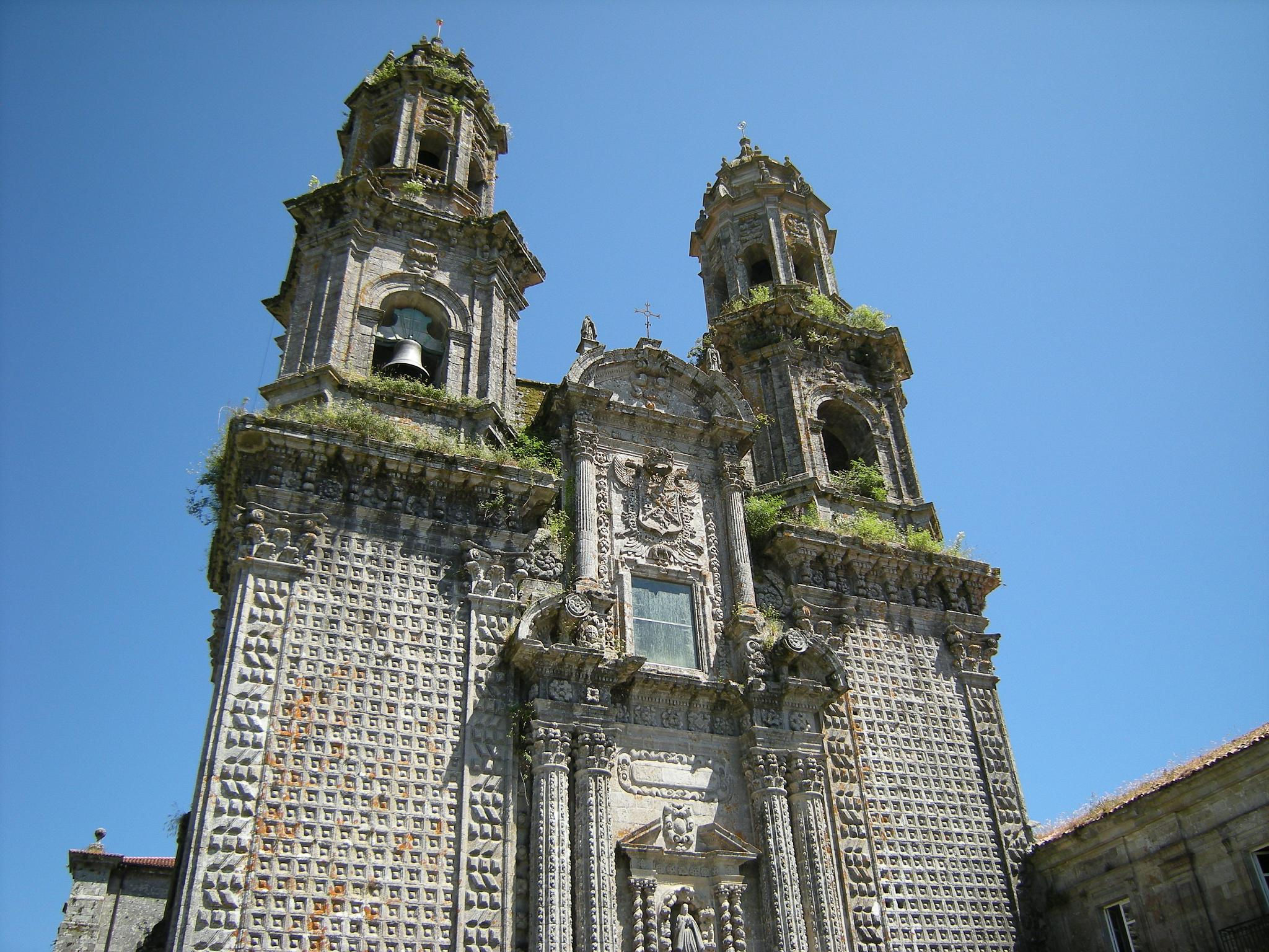 La iglesia de Santa María sigue así de bonita como veis.